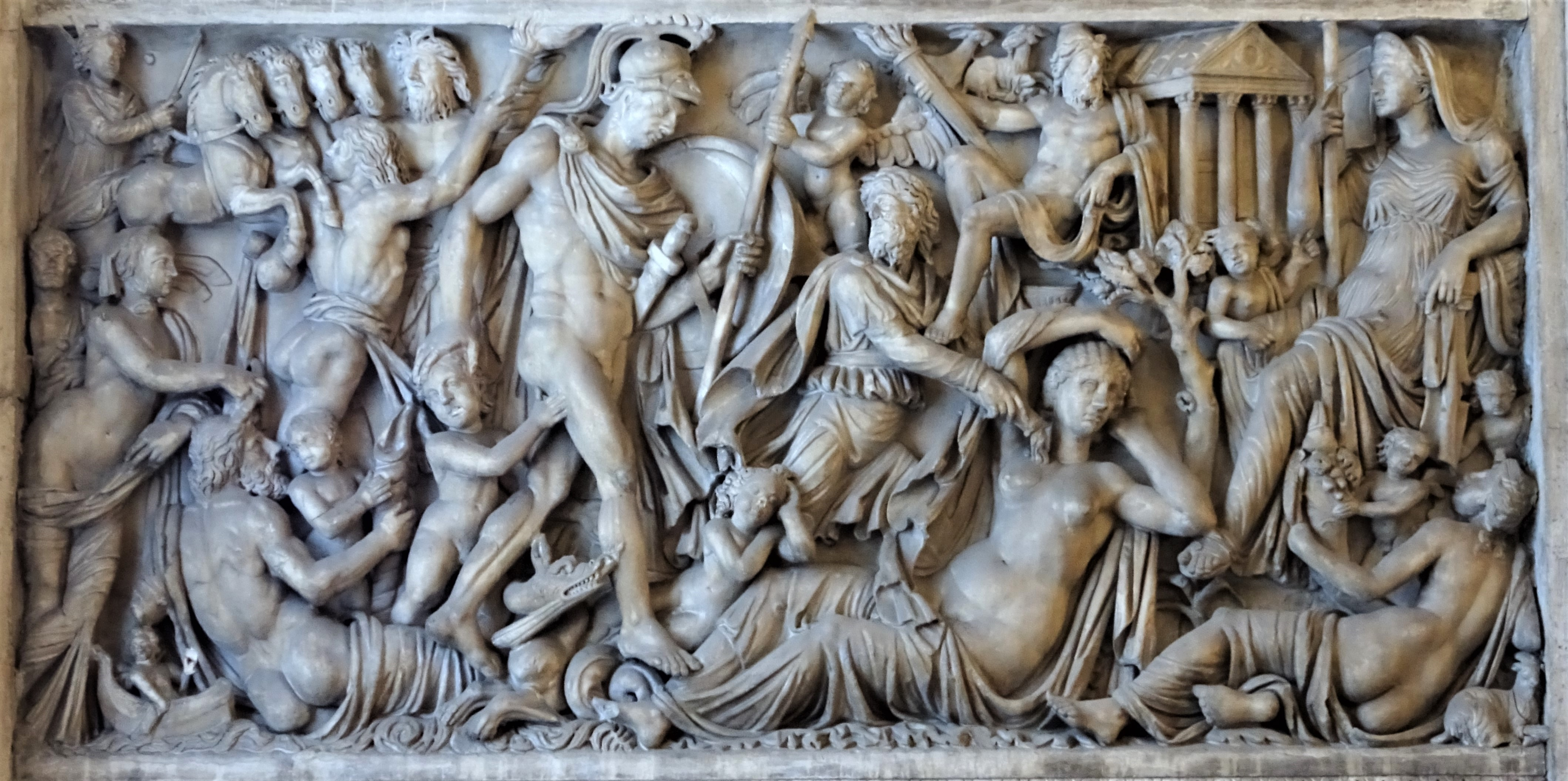 Mars richt zich tot Rhea Silvia. Voorzijde van een derde-eeuwse sarcofaag, in de traphal van het Palazzo Mattei te Rome